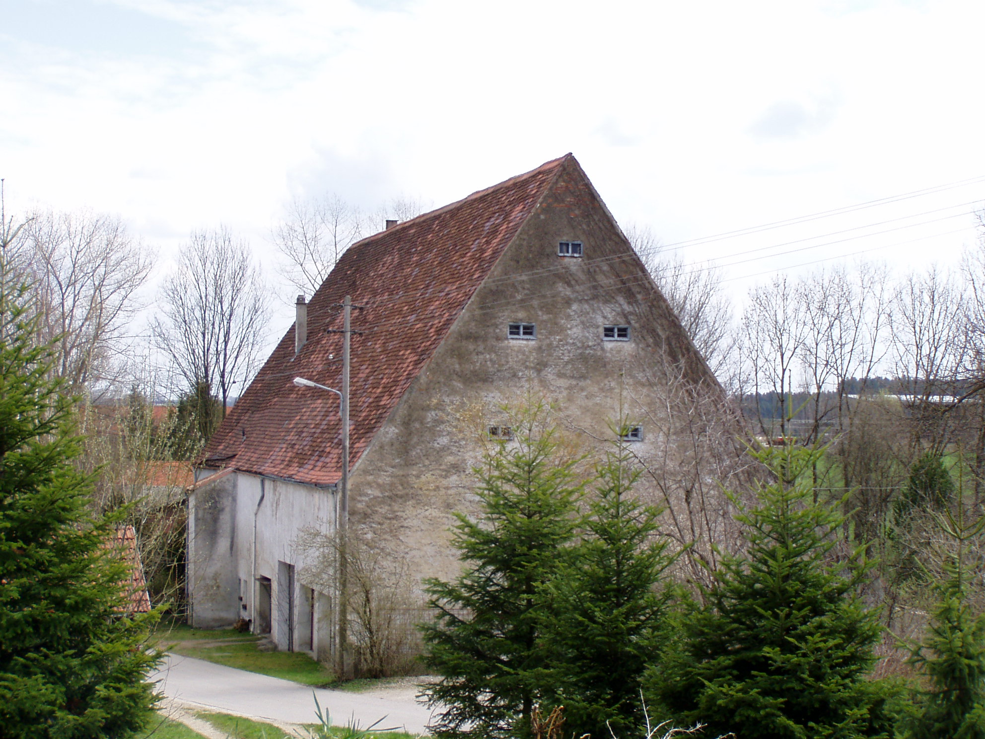 Ehemaliges Pfarrhaus in Westendorf (Ostallgäu)